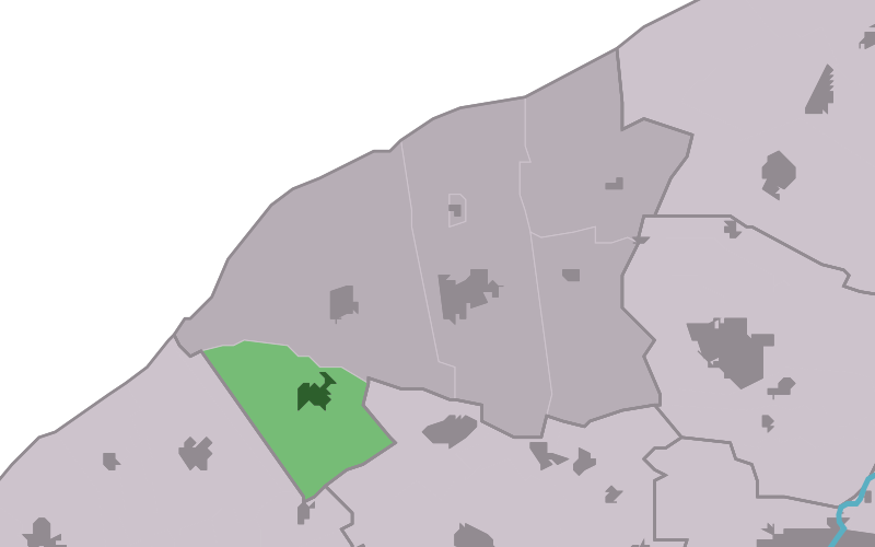 Kaartsje fan himrik fan Minnertsgea